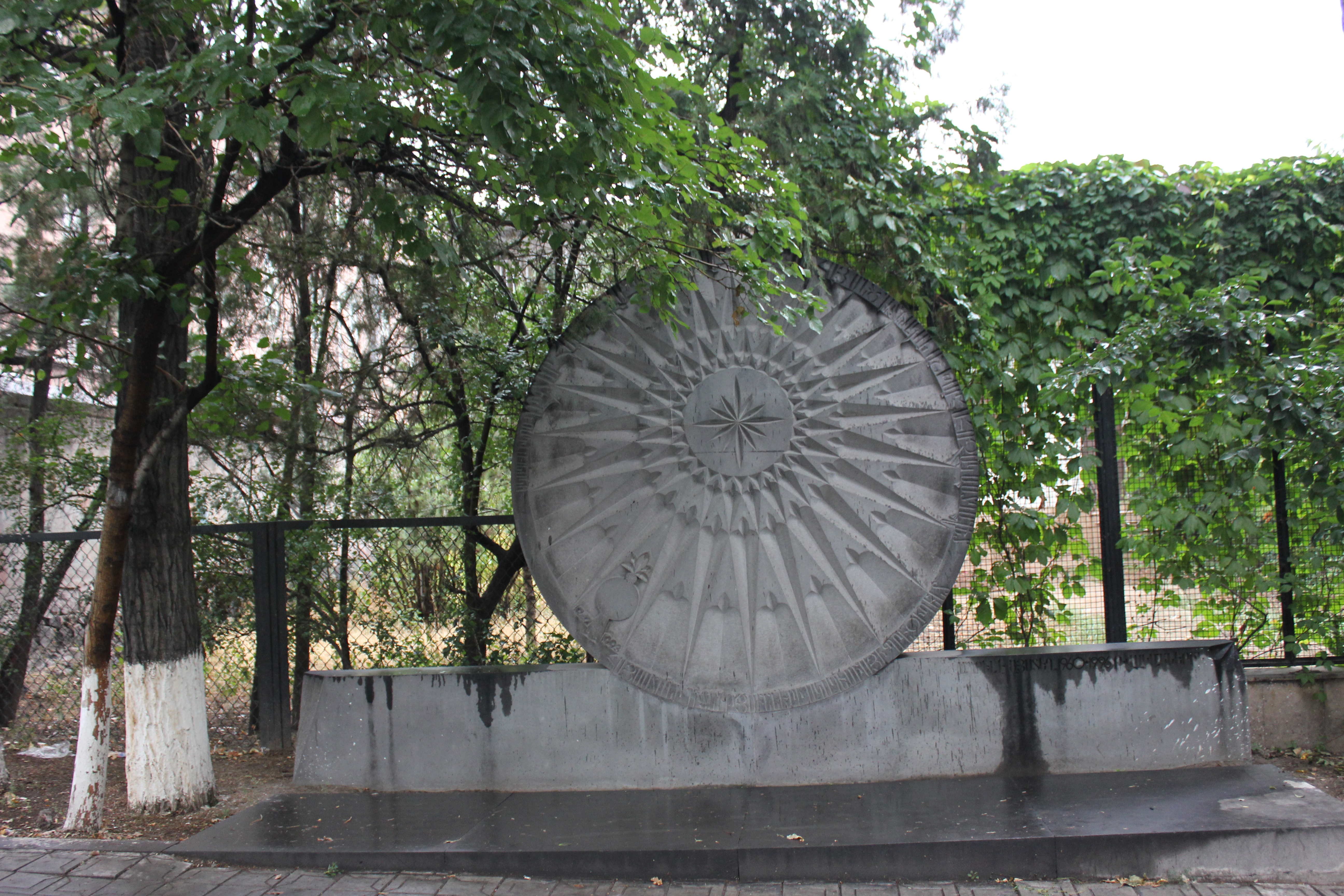 Հուշակոթող Վիկտոր Համբարձումյանին 1996 թ., իր բնակելի տան առջև։ 6/38.1